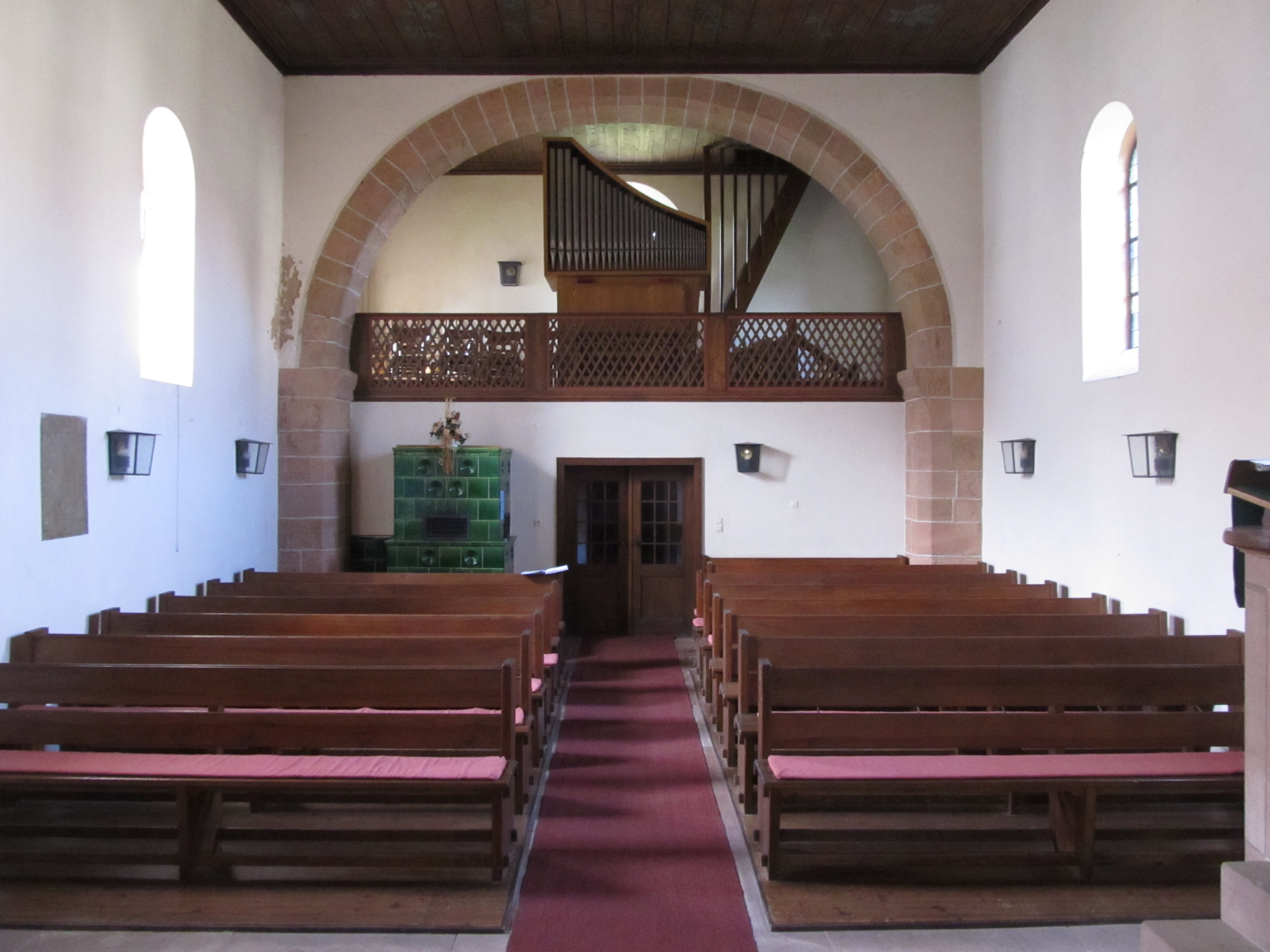 Blick ins Innere der protestantischen Stephanuskirche in Böckweiler, einem Stadtteil von Blieskastel, Saarland